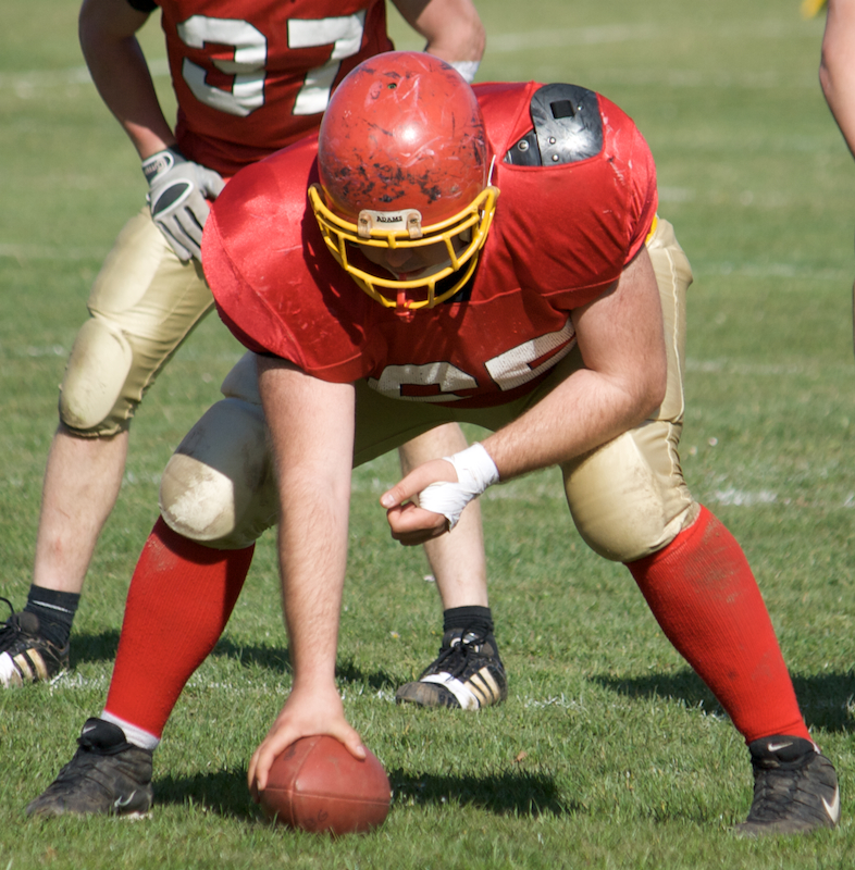 American Football - Center vor dem Long Snap